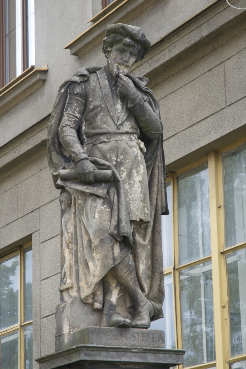 Paolo della Stella, socha od Mořice Černila na zdi kamenické školy v Hořicích